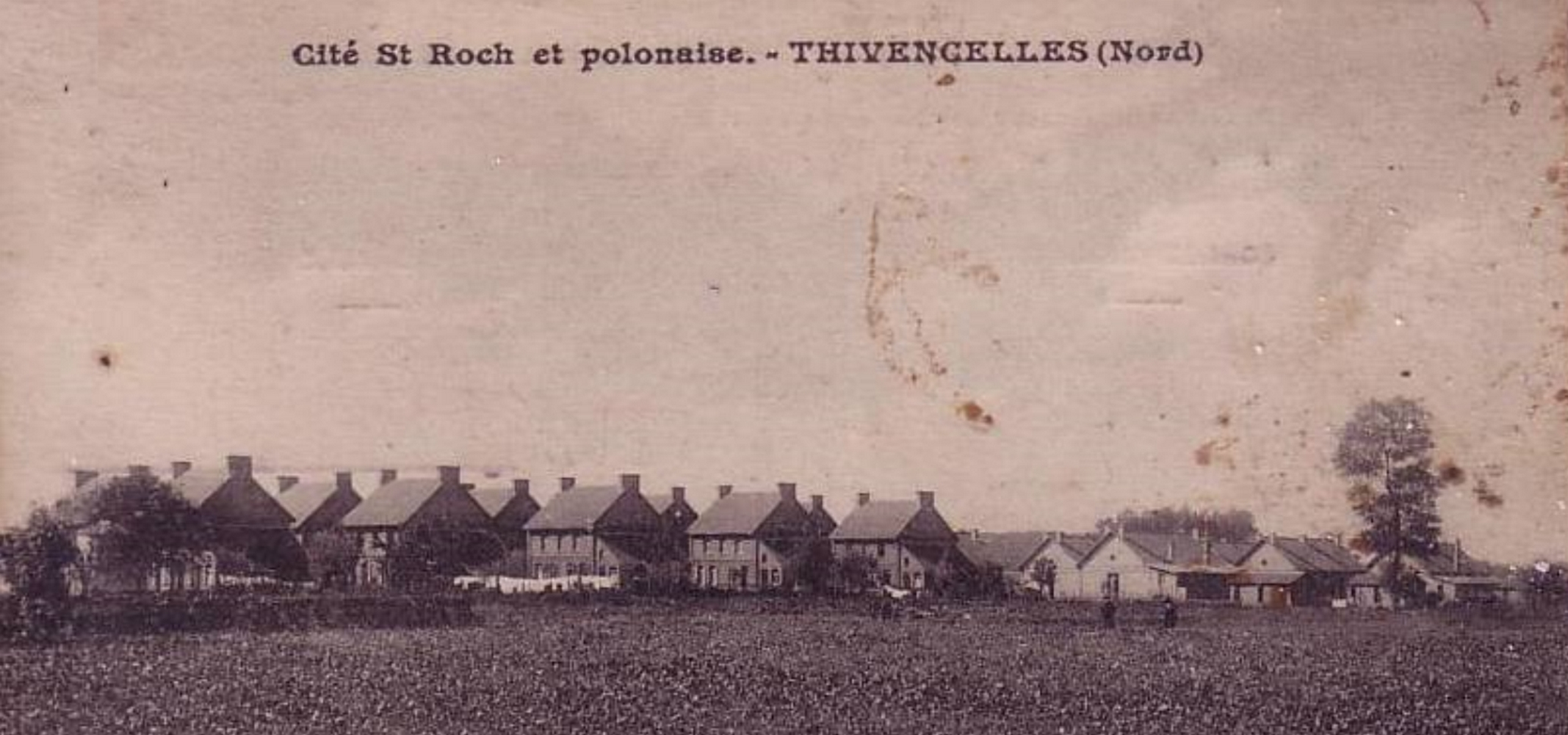 Cité Saint-Roch de la fosse Saint-Pierre de la Compagnie des mines de Thivencelle dans le bassin minier du Nord-Pas-de-Calais, Thivencelle, Nord, Nord-Pas-de-Calais, France.